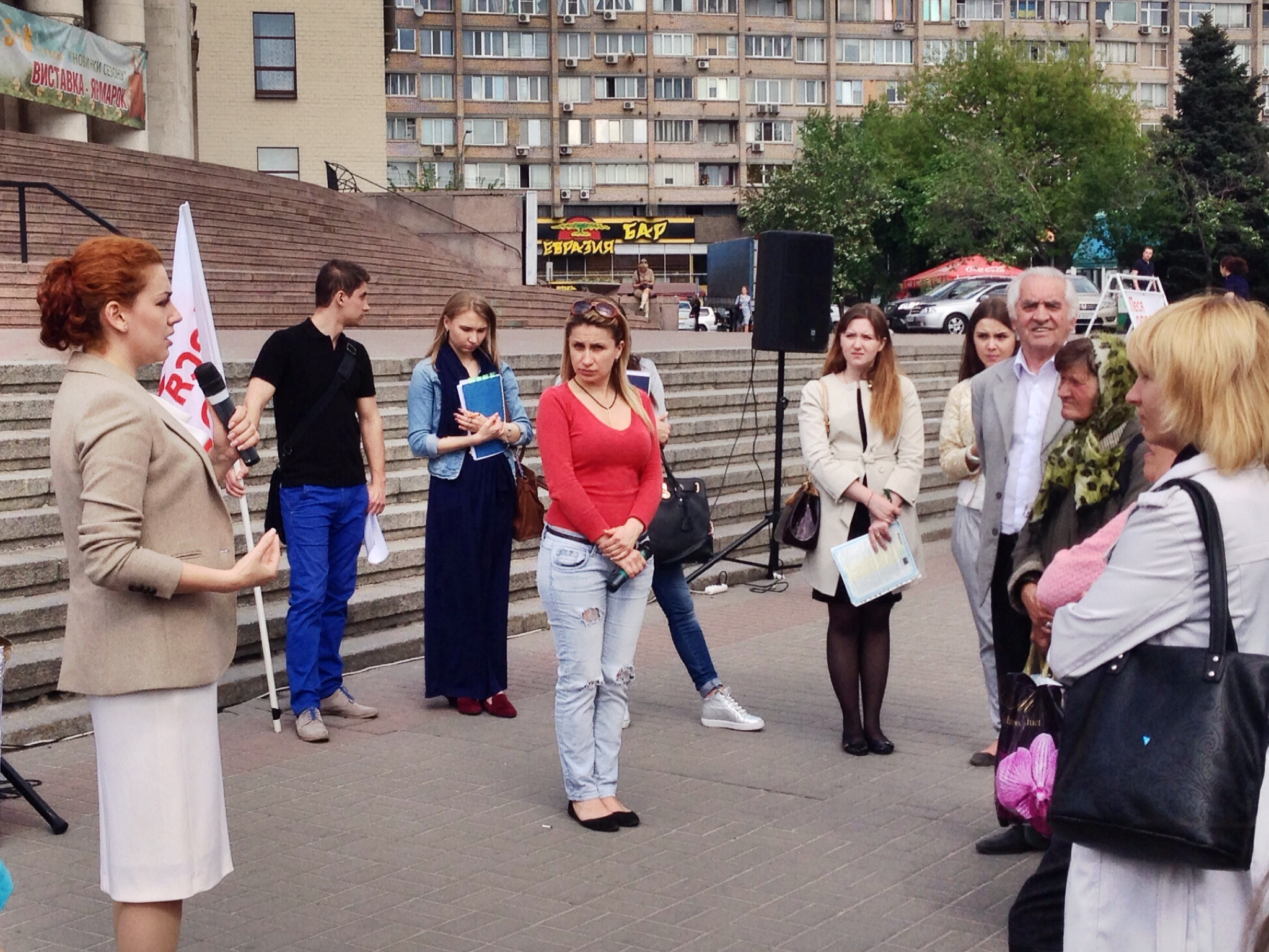 Lesya Orobets meeting with voters